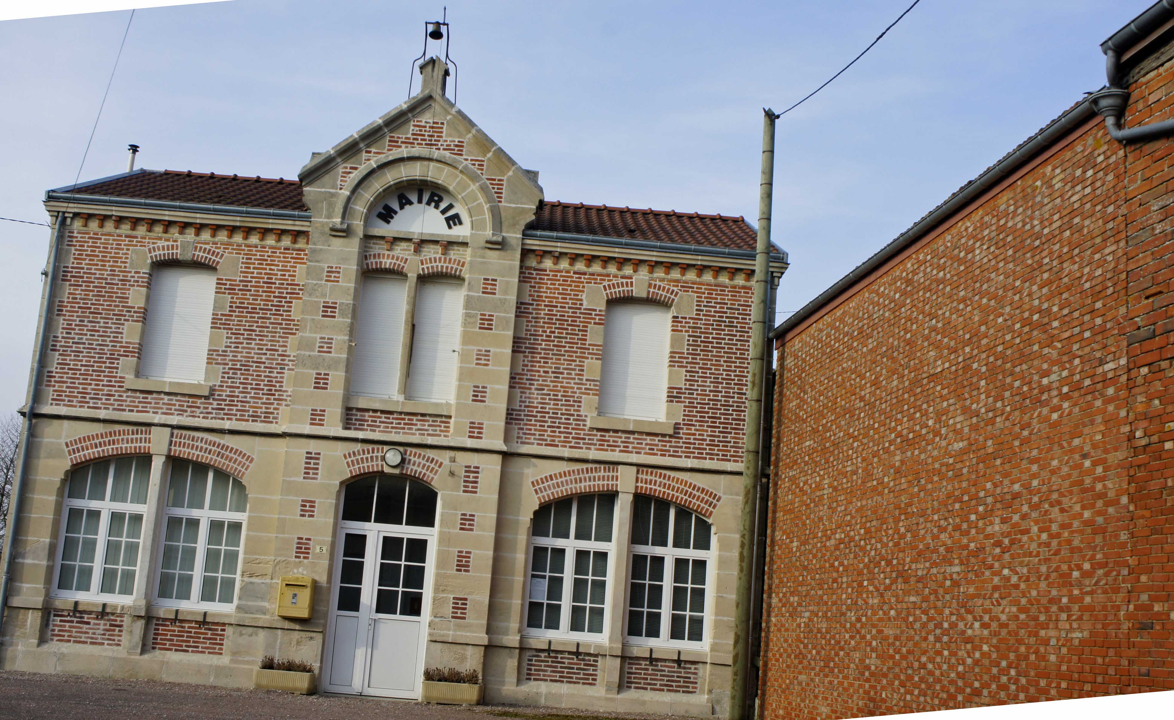 Dampierre le Château, vue de la Mairie.